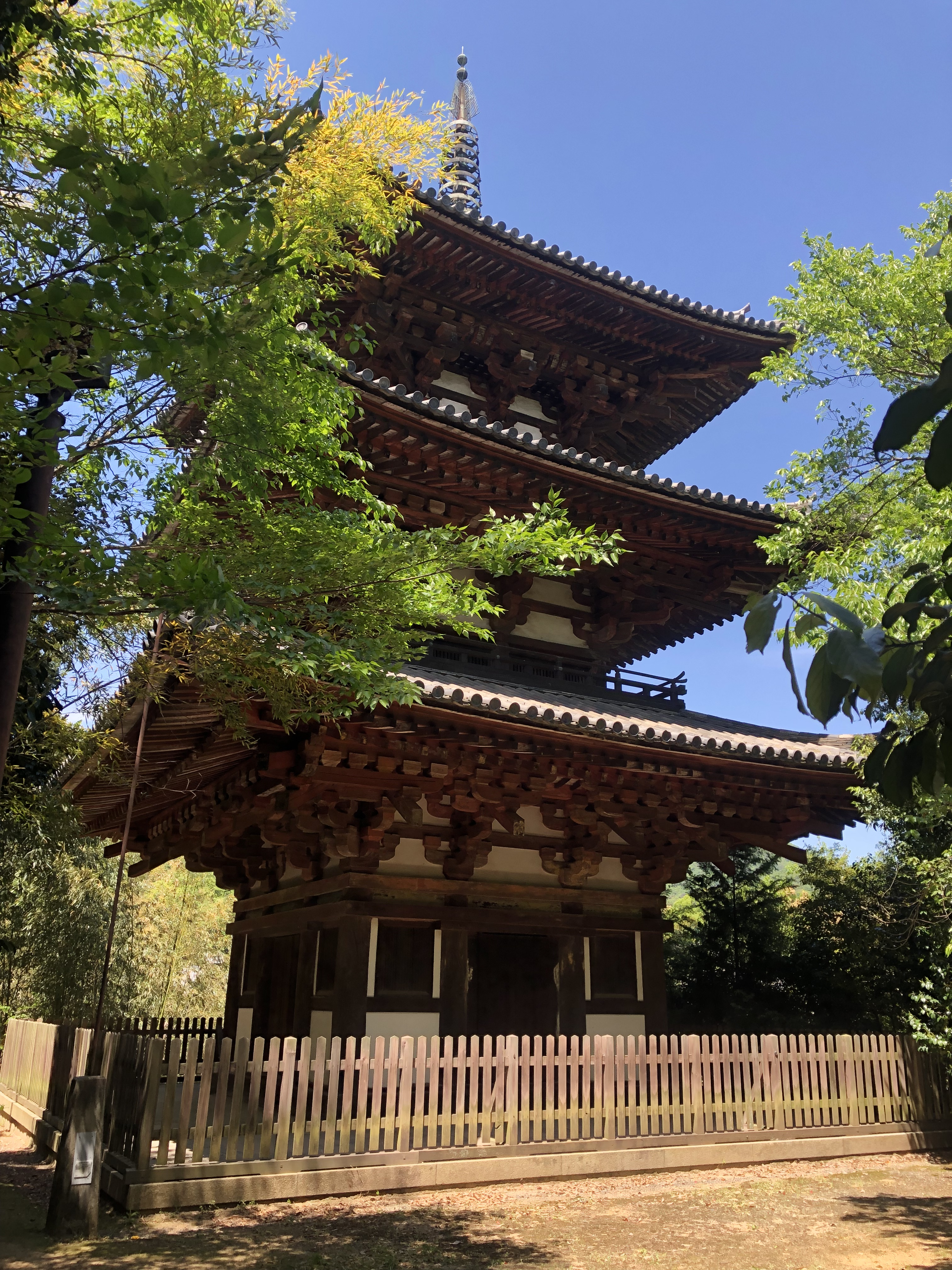 當麻寺東塔 (2019年5月)